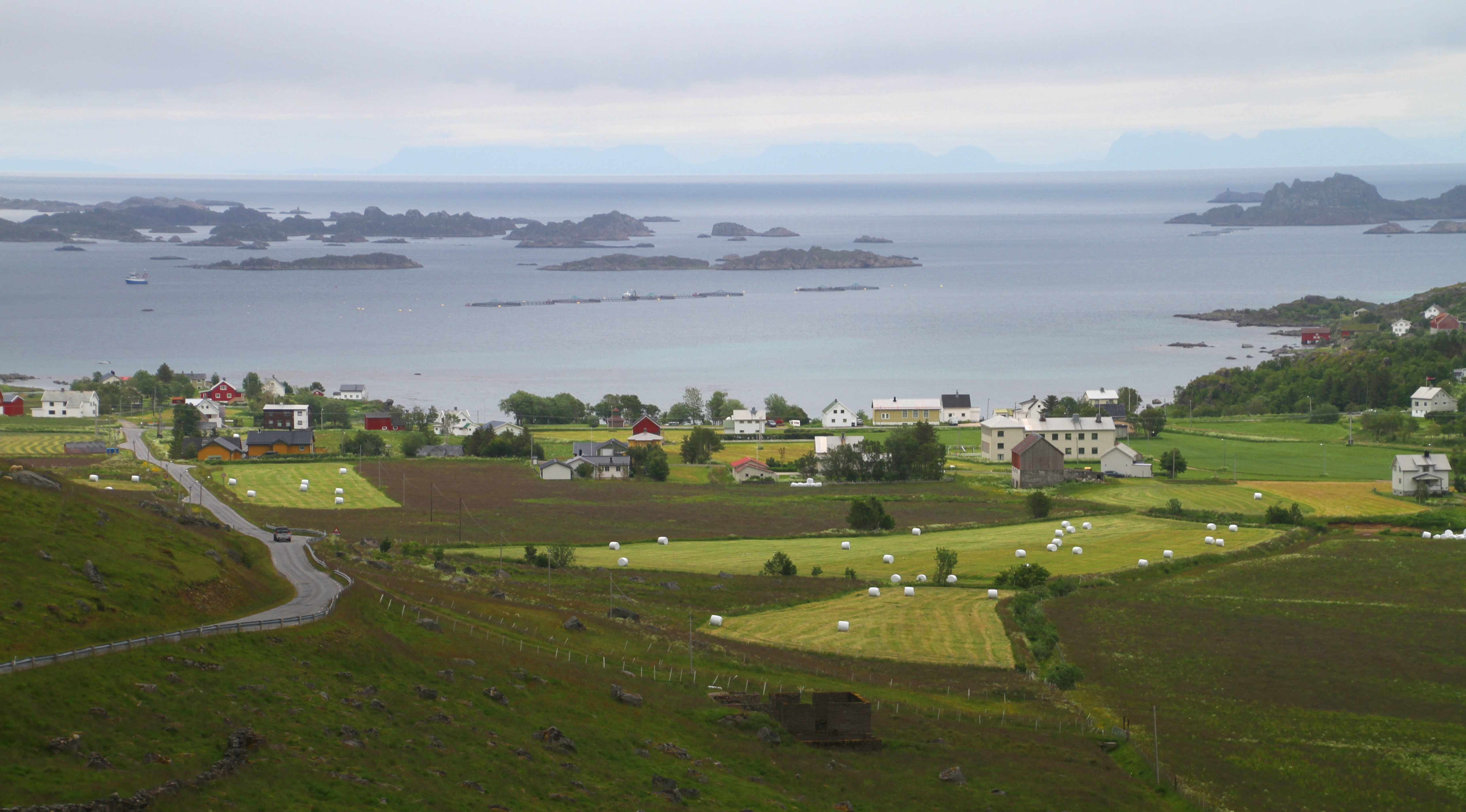 Sennesvik auf Vestvågøy (Lofoten, Norwegen)